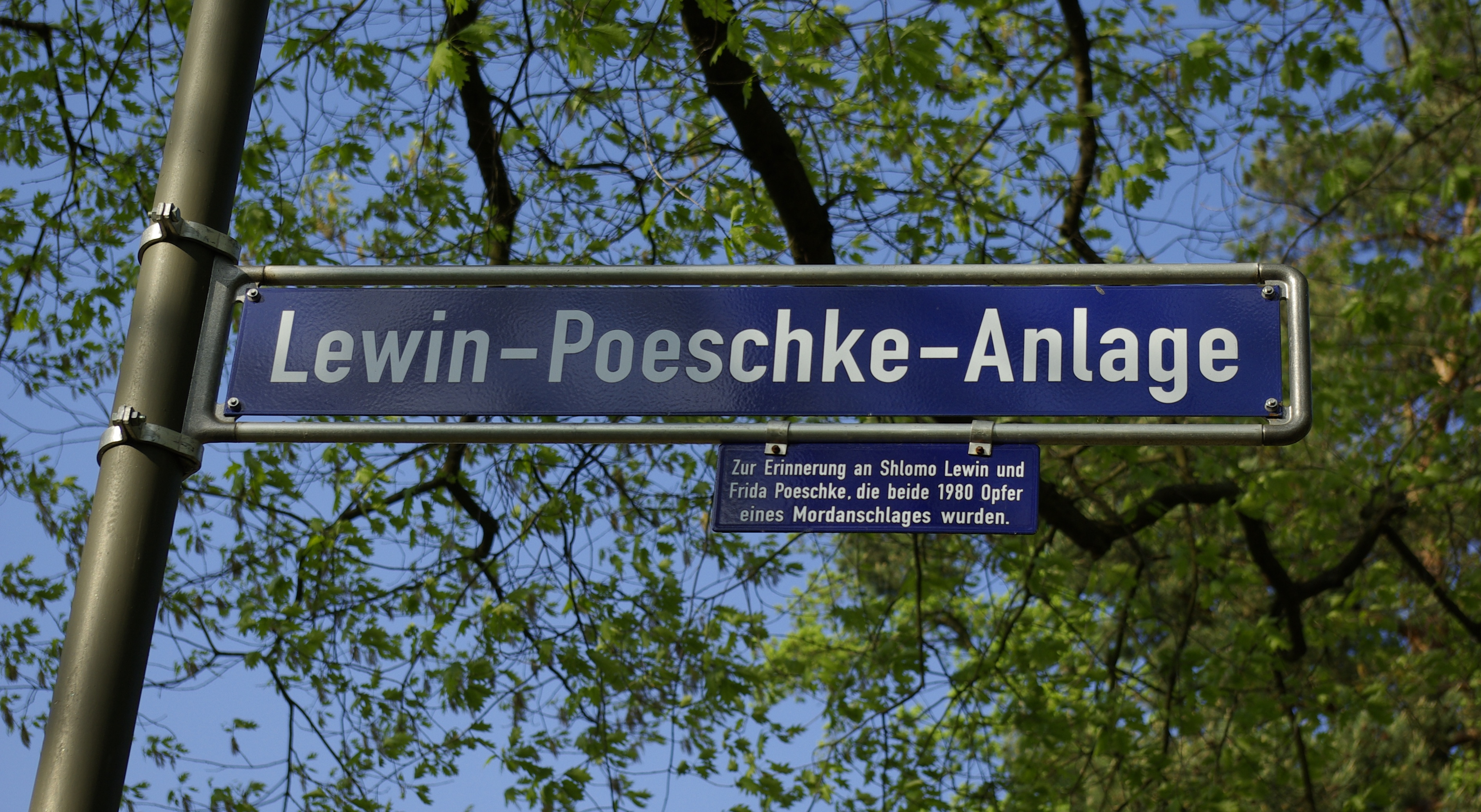 Straßenschild an der am 15. Dezember 2010 nach Shlomo Lewin und Frida Poeschke benannten Lewin-Poeschke-Anlage in Erlangen.